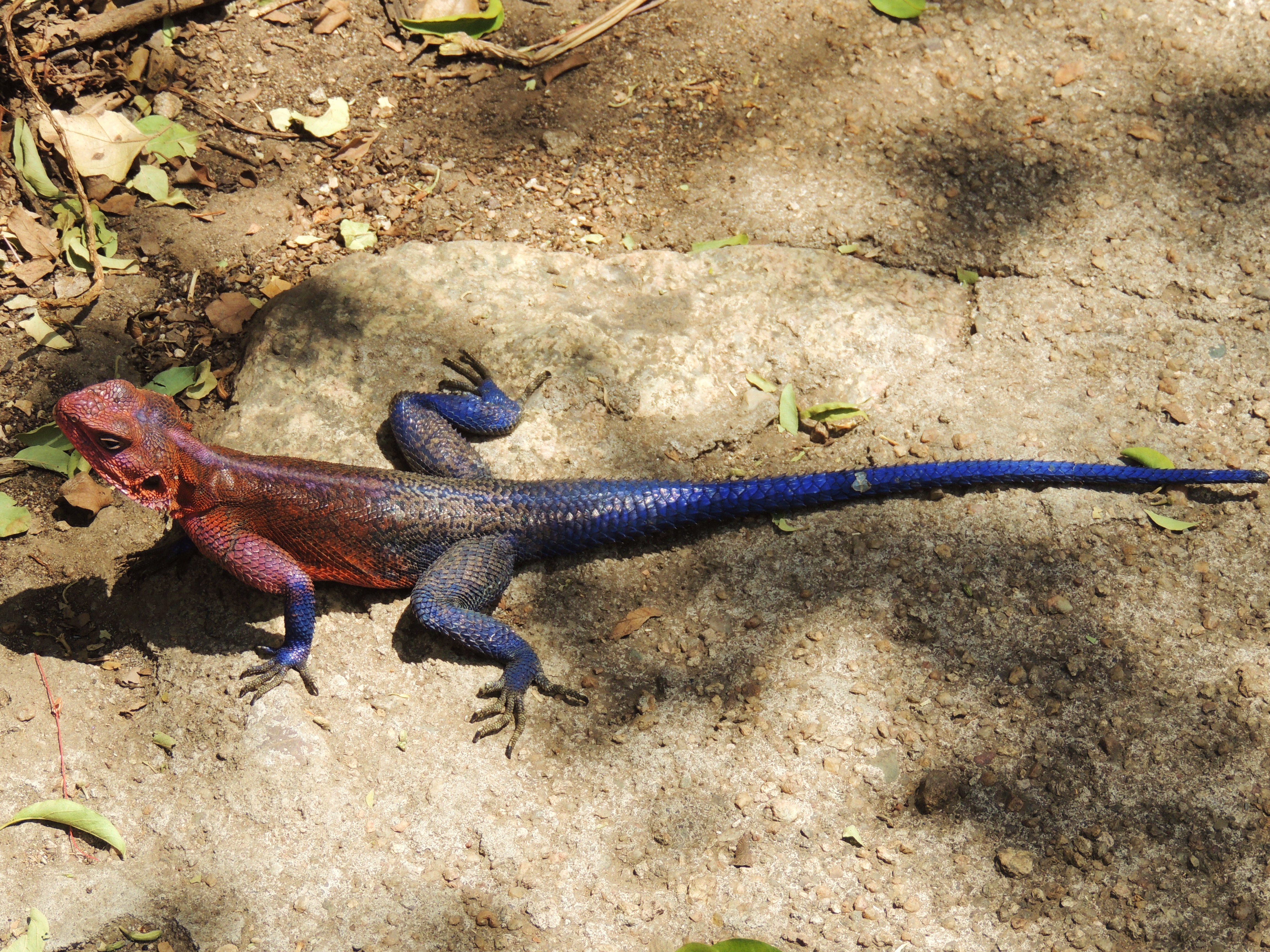 Agama mwanzae (Mwanza flat-headed agama)